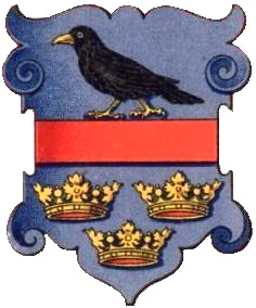 Wappen von Galizien